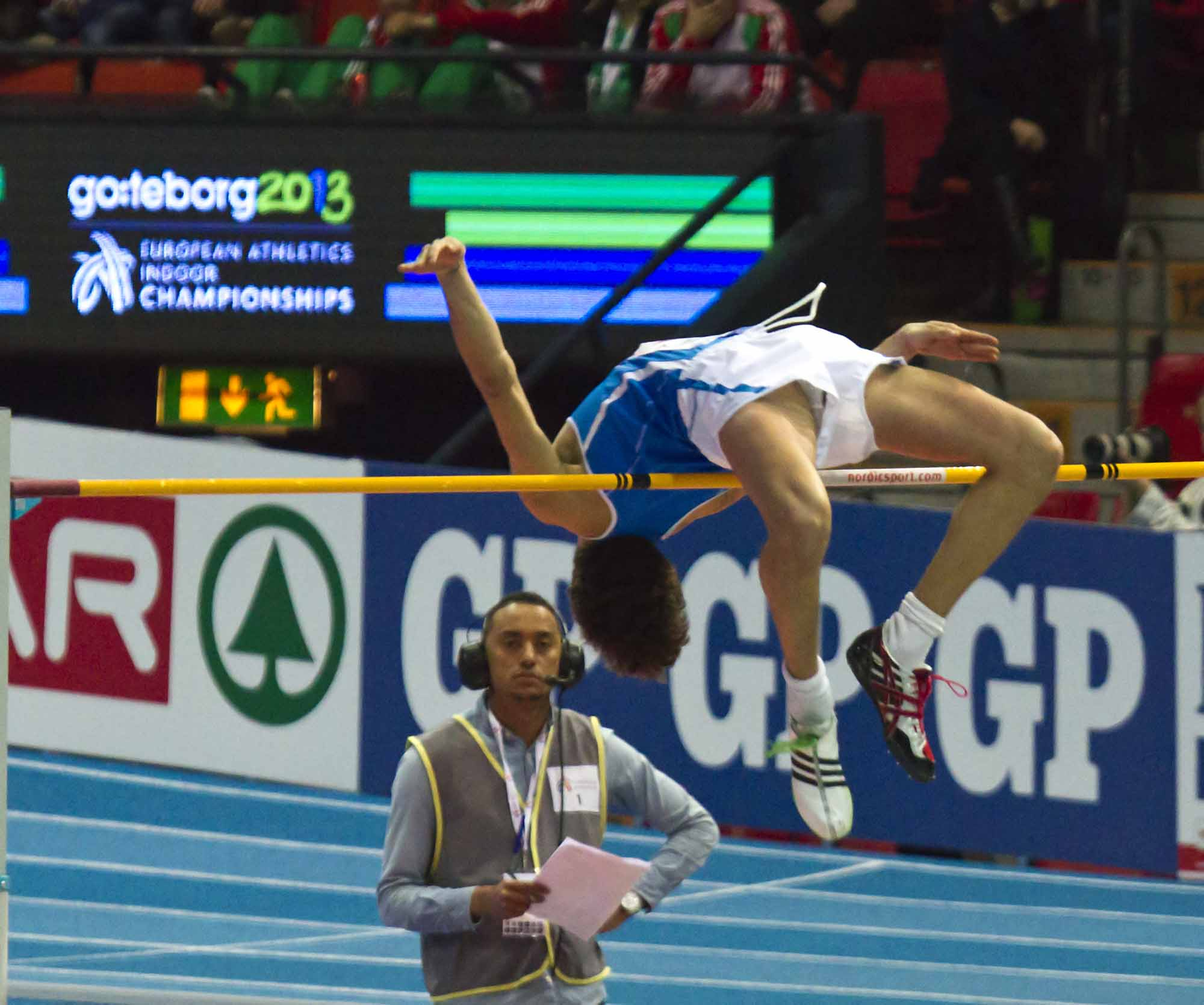 330 tamberi